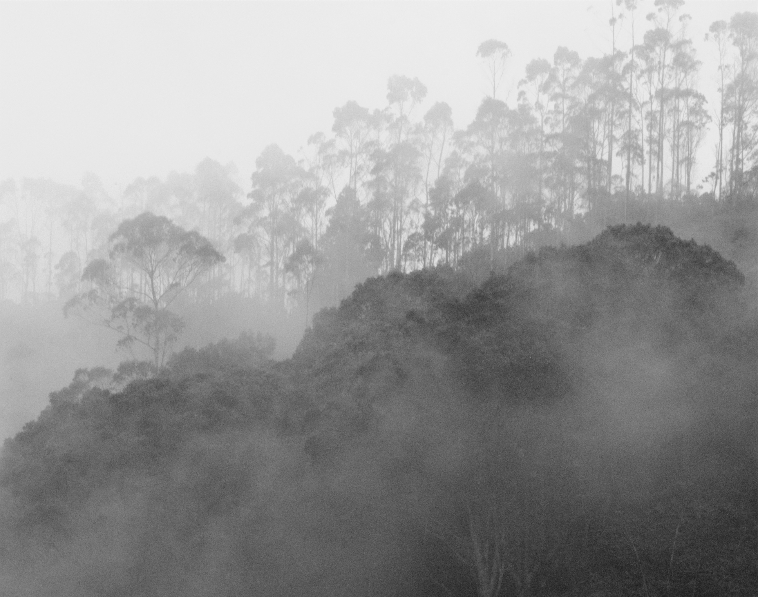 Bosque de Niebla, Colombia